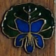 Viol fra rammen til maleriet "Foråret"